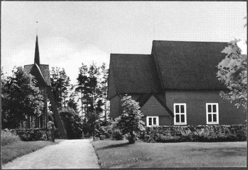 Kyrkan mot öster. Kategori: (01) ExteriörerKyrkan mot öster.